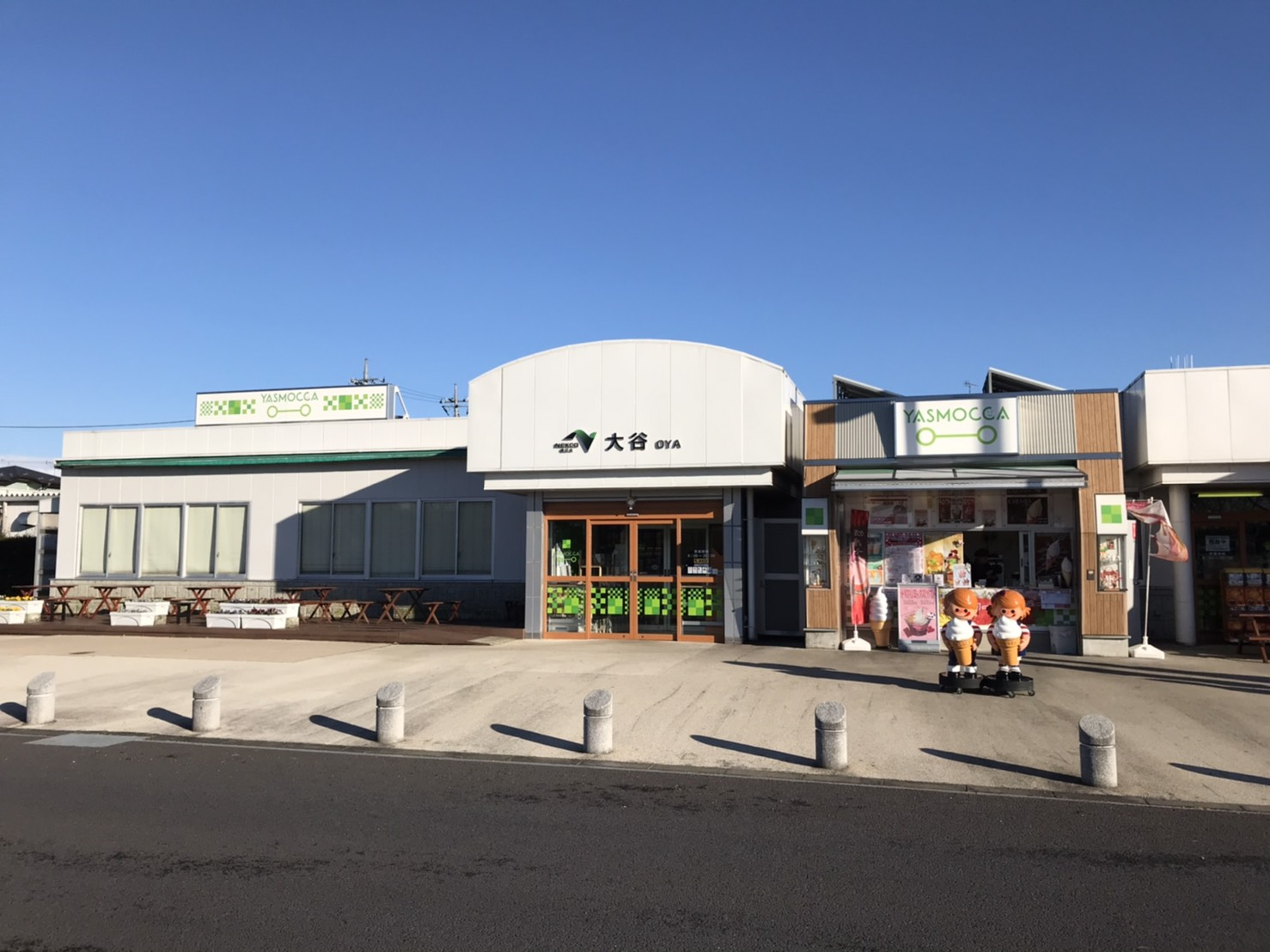 上り線の左側